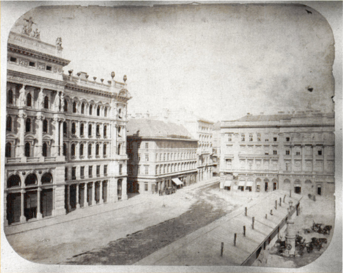 Borsos József felvételén már állt szemben a Háznégyszög (Gerbeaud-ház) épületcsoportja, a tér nyugati oldalán a frissen elkészült Haas-palota, a tér közepét pedig a másfél évig tartó építkezési huzavona során emelt bazár foglalta el